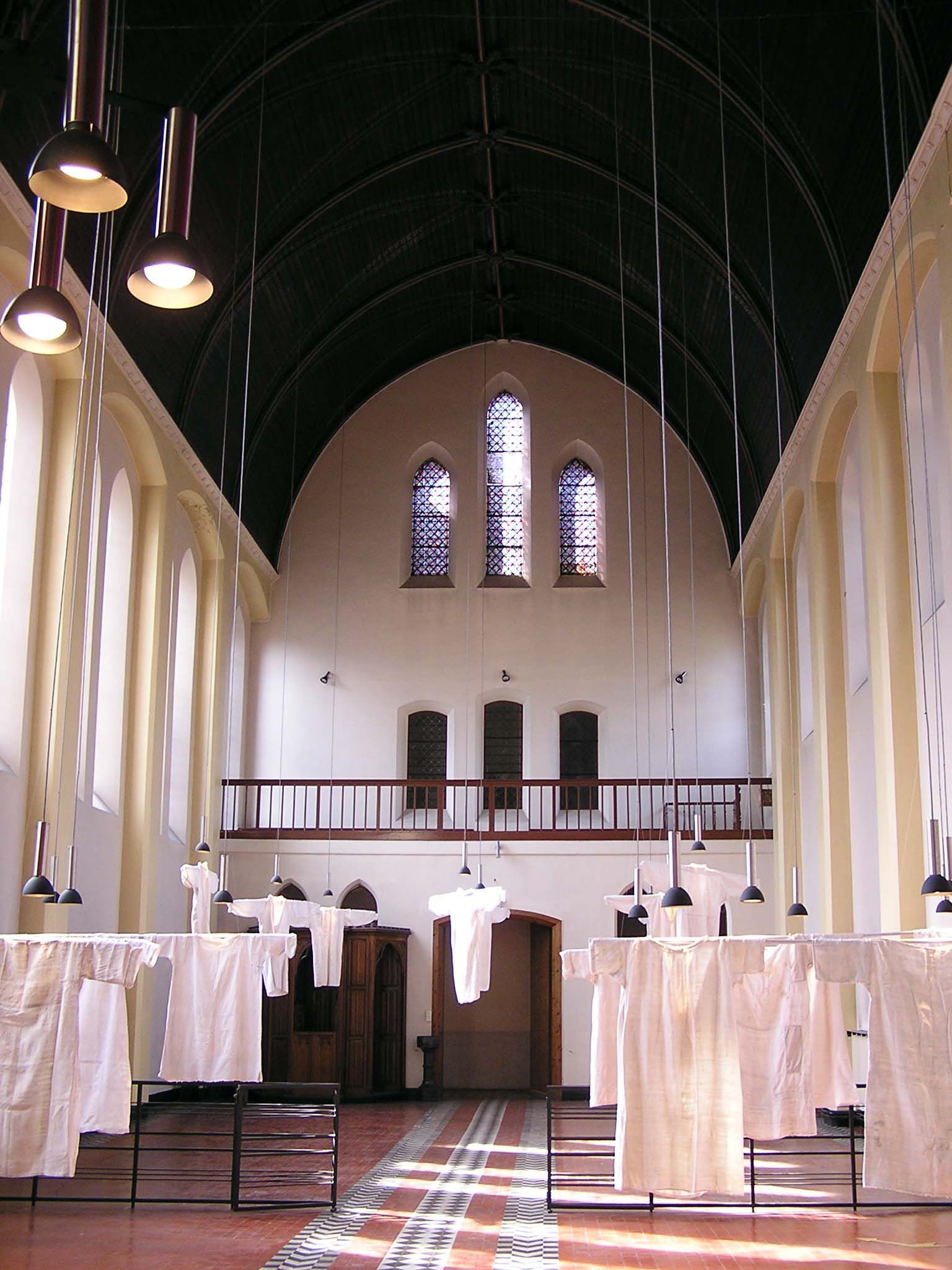 Couvent des Clarisses, 2 rue de WasquehalAllée des Clarisses (Inscrit, 2010) .